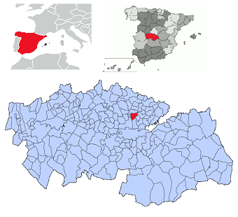 Yunclillos en la provincia de Toledo